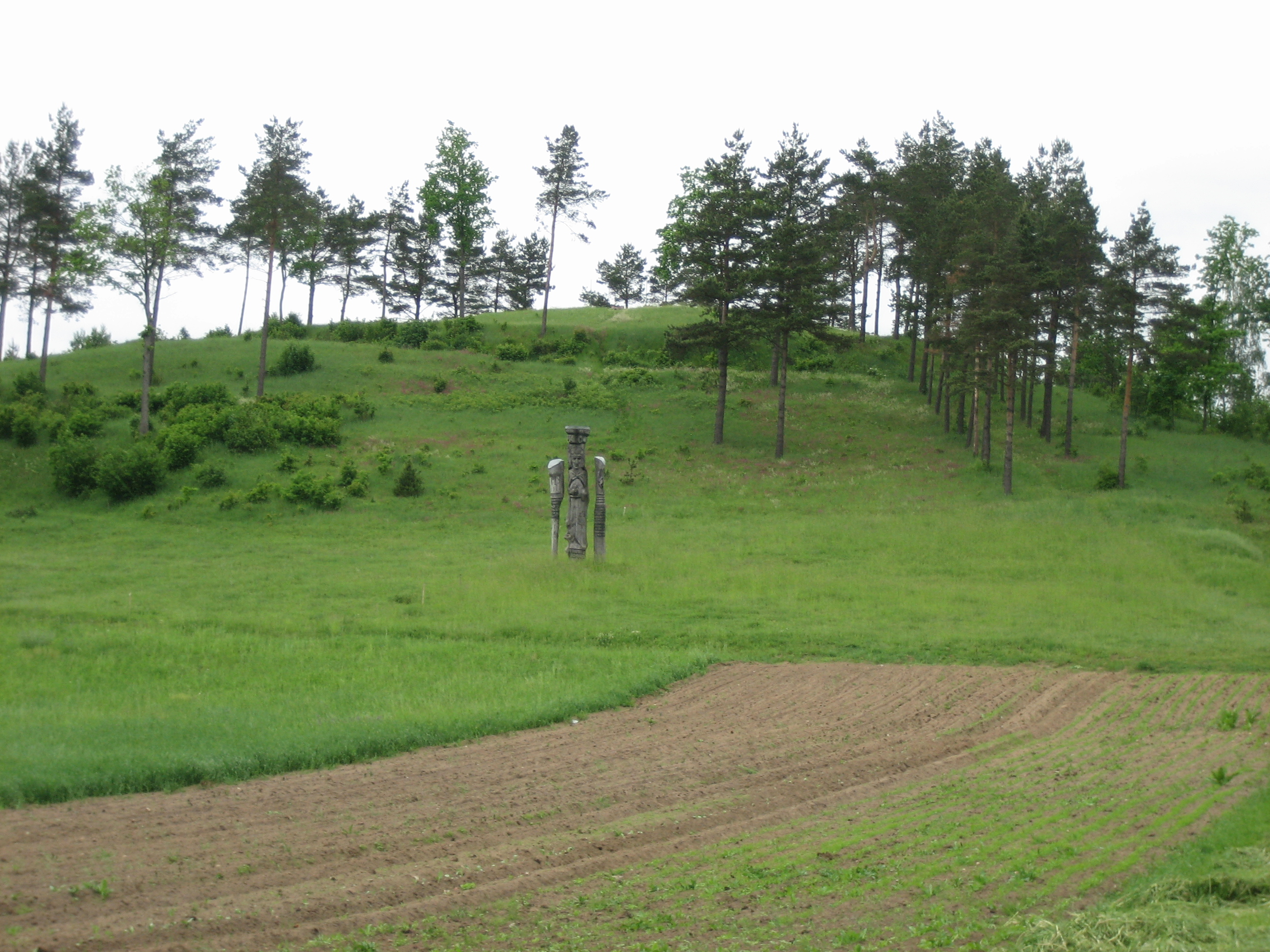 Kepeliuškalnis, Šilalės raj.